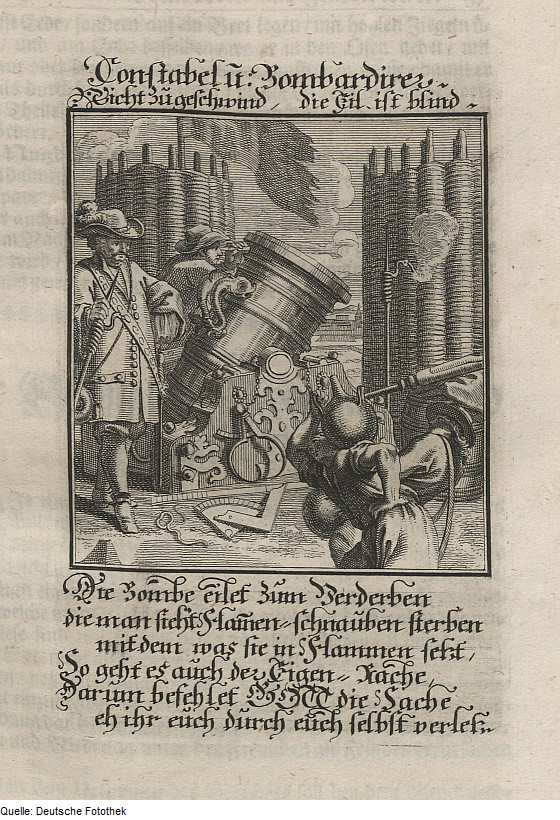 Original image description from the Deutsche Fotothek Ständebuch & Militär & Artillerie & Kanone & Büchsenmeister & Feuerwerker